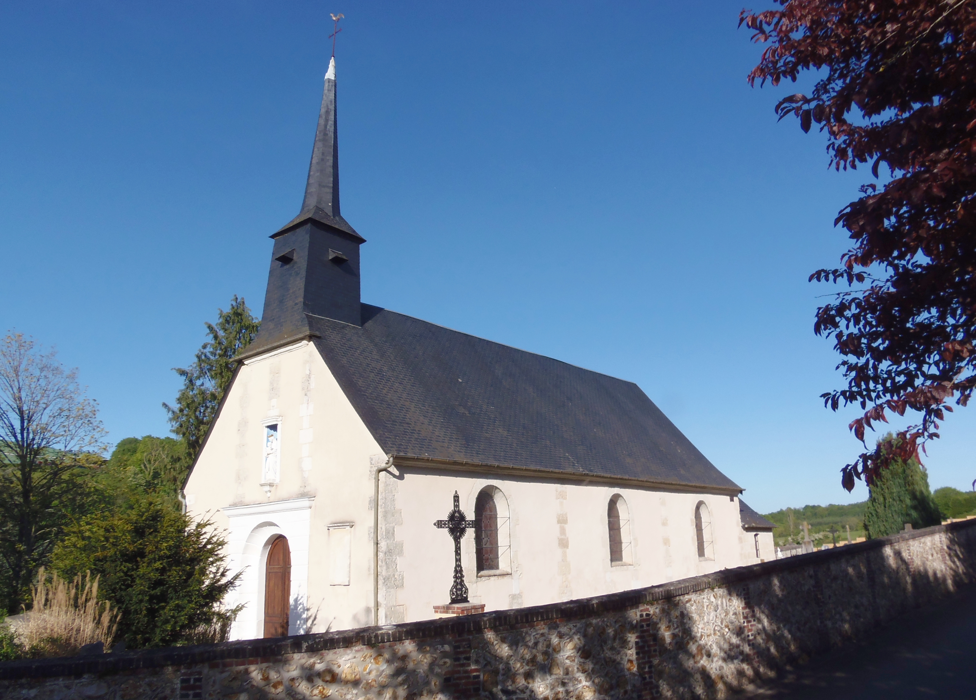 La Vespière (Normandie, France). L'église Saint-Ouen.